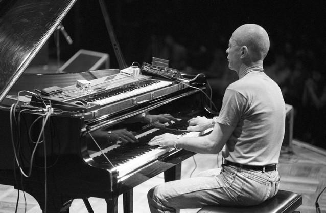 der Pianist Siegfried Kessler auf dem St. Ingberter Jazzfestival 1990